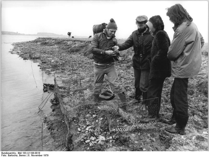 Kontrolle des Vogelbestands ADN-ZB Bartocha 8.11.1979 Bez. Neubrandenburg: Um den Schutz der Vogelwelt im Kreis Röbel geht es dem ehrenamtlichen Naturschutzbeauftragen des Kreises, Peter Krägenow (l.). Er ist für drrei Naturschutzgebiete mit rund 750 Hektar verantwortlich, wozu die Halbinsel "Großer Schwerin" an der Müritz gehört. Zur Zeit werden dort Strandläufer, Wasserläufer, Regenpfeifer, Schnepfen und die seltenen Alpenstrandläufer in Reusen gefangen, vermessen und beringt. Dabei helfen viele ehrenamtliche Ornithologen.